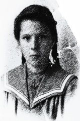 Genoveva Ríos, niña boliviana que en febrero de 1879, a sus 14 años de edad, durante la invasión chilena al puerto boliviano de Antofagasta que dió inicio a la Guerra del Pacífico, protegío la bandera boliviana del edificio de la Intendencia de la Policía de Antofagasta.